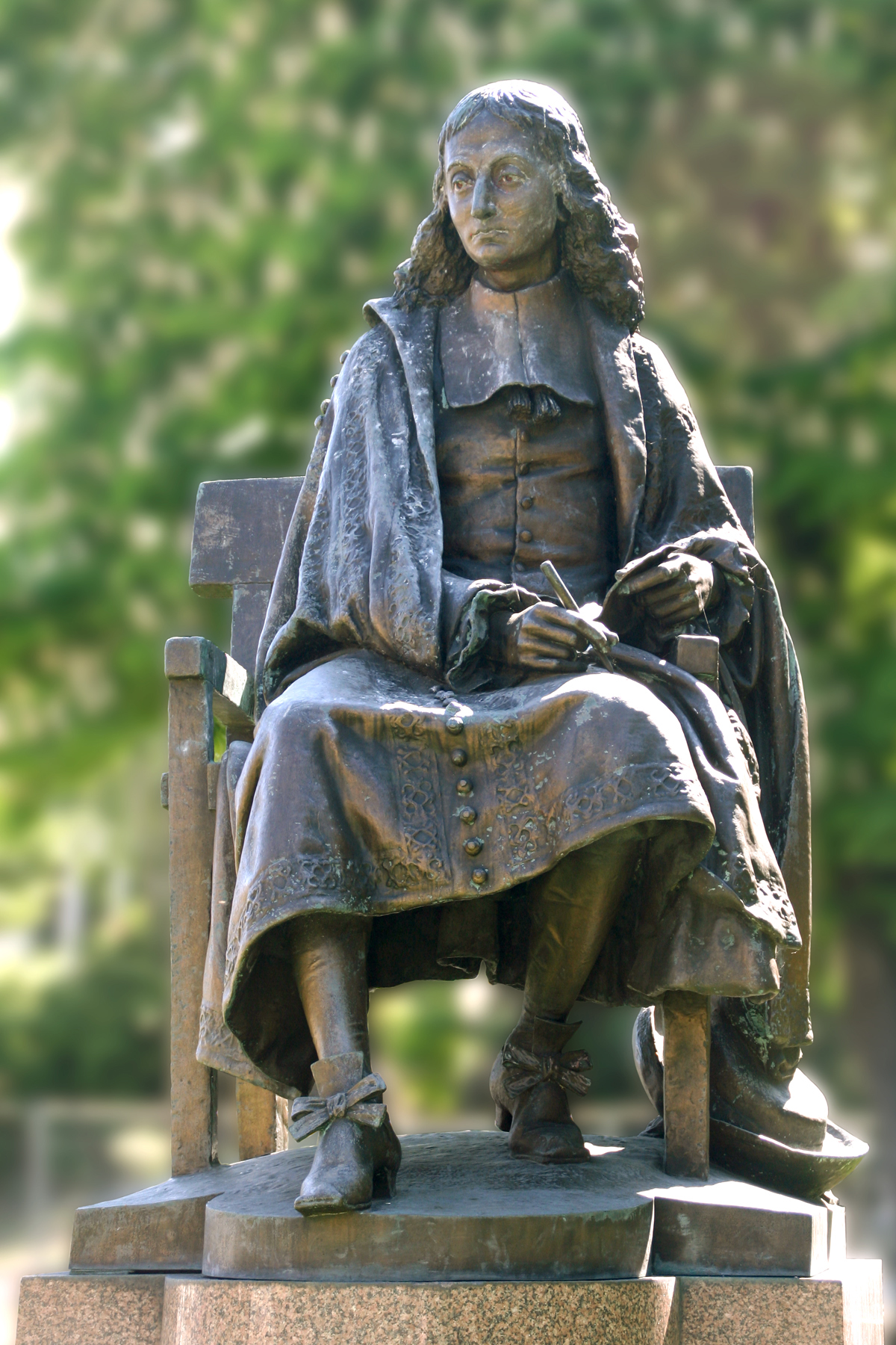 statue de Blaise Pascal de 1879 par Eugène Guillaume dans le square Pascal à Clermont-Ferrand.